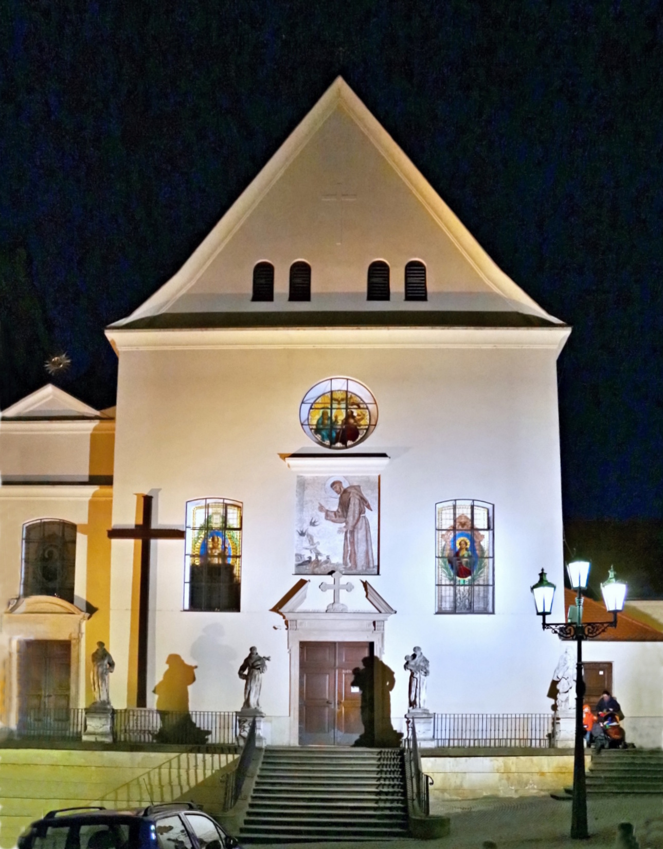 Kapucínský kostel v Brně